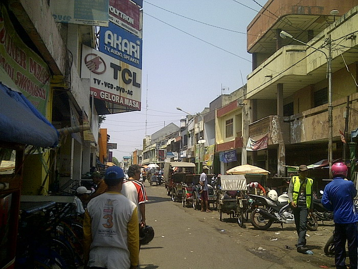 Kawasan Jalan Lemahwungkuk Kota Cirebon, Jawa Barat